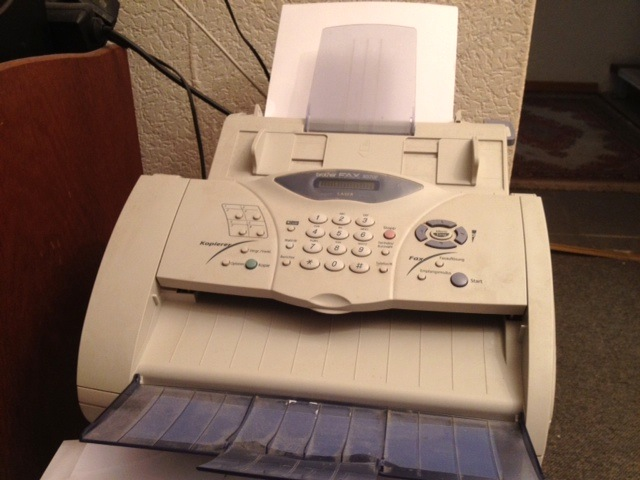 Ein Laserfax, dass dem neuen Standard MMR entspricht;Brother Fax 8070 p